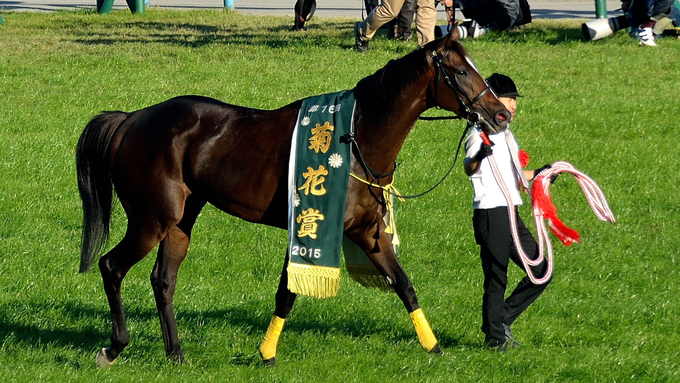 2015年10月25日に京都競馬場で行われた「第76回菊花賞」で、優勝レイを着装した勝利馬キタサンブラックを、観客席から撮影したもの。